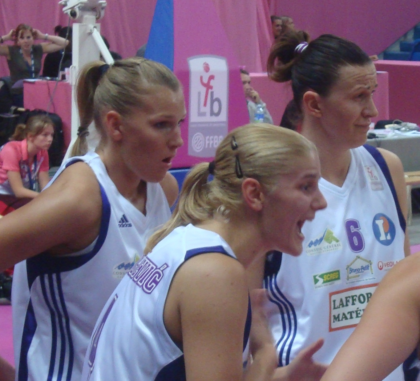 Les basketteuses lituanienne Vaida Sipavičiūtė, monténégrine Jelena Dubljević et serbe Ivanka Matić à l'Open LFB (de gauche à droite).